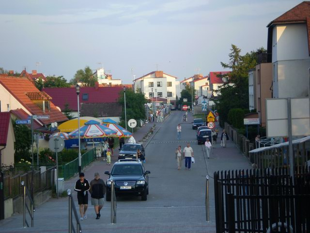 Ulica Morska w Unieściu - zdjęcie autorstwa EGA.